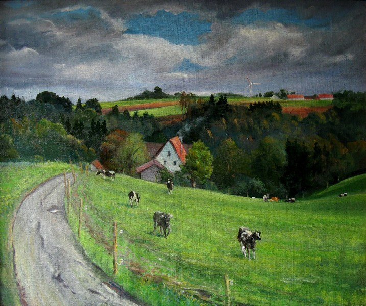 В окрестностях Бибераха